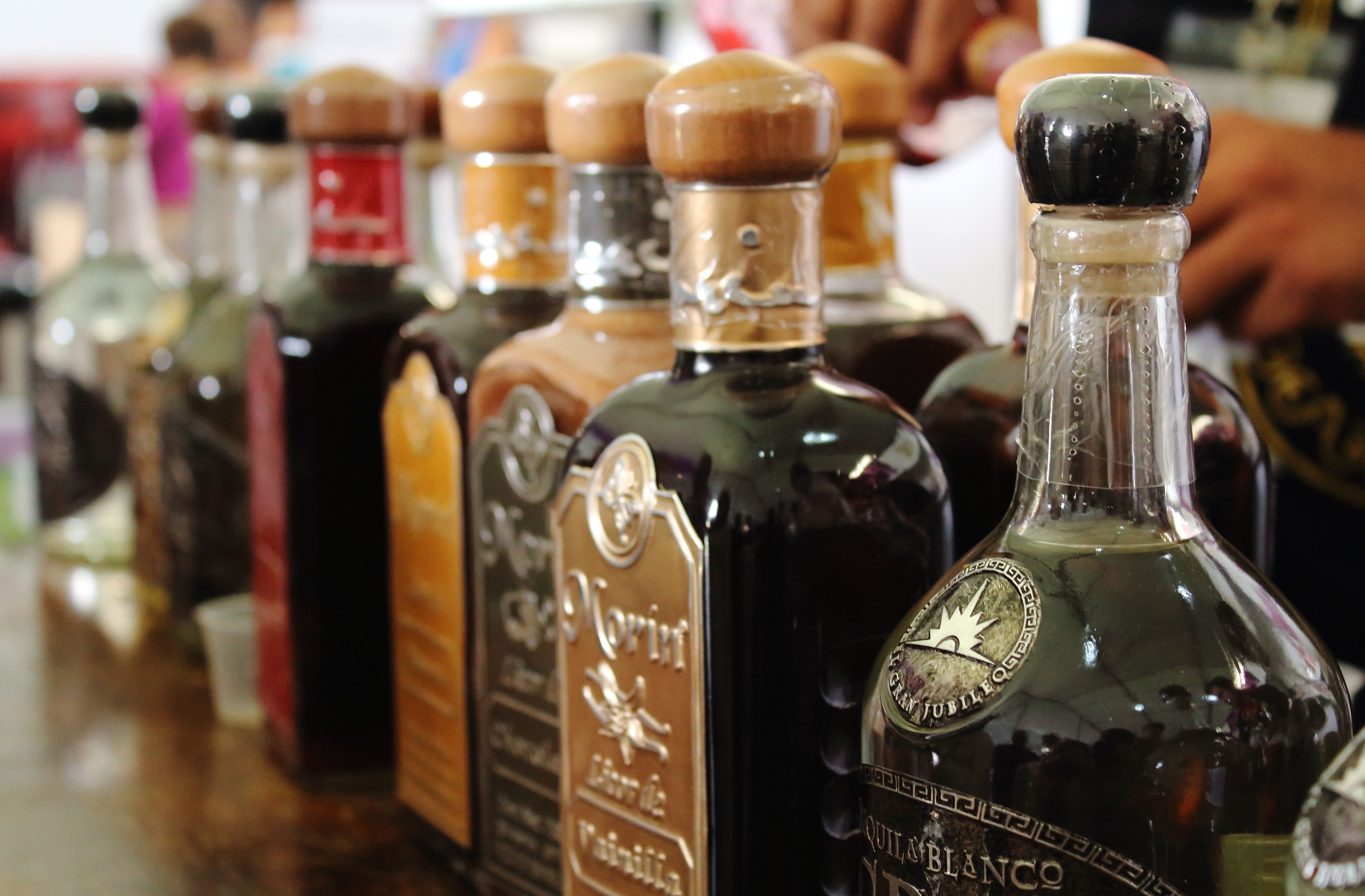 Tequilas de diversos sabores hechos en Jalisco, México.